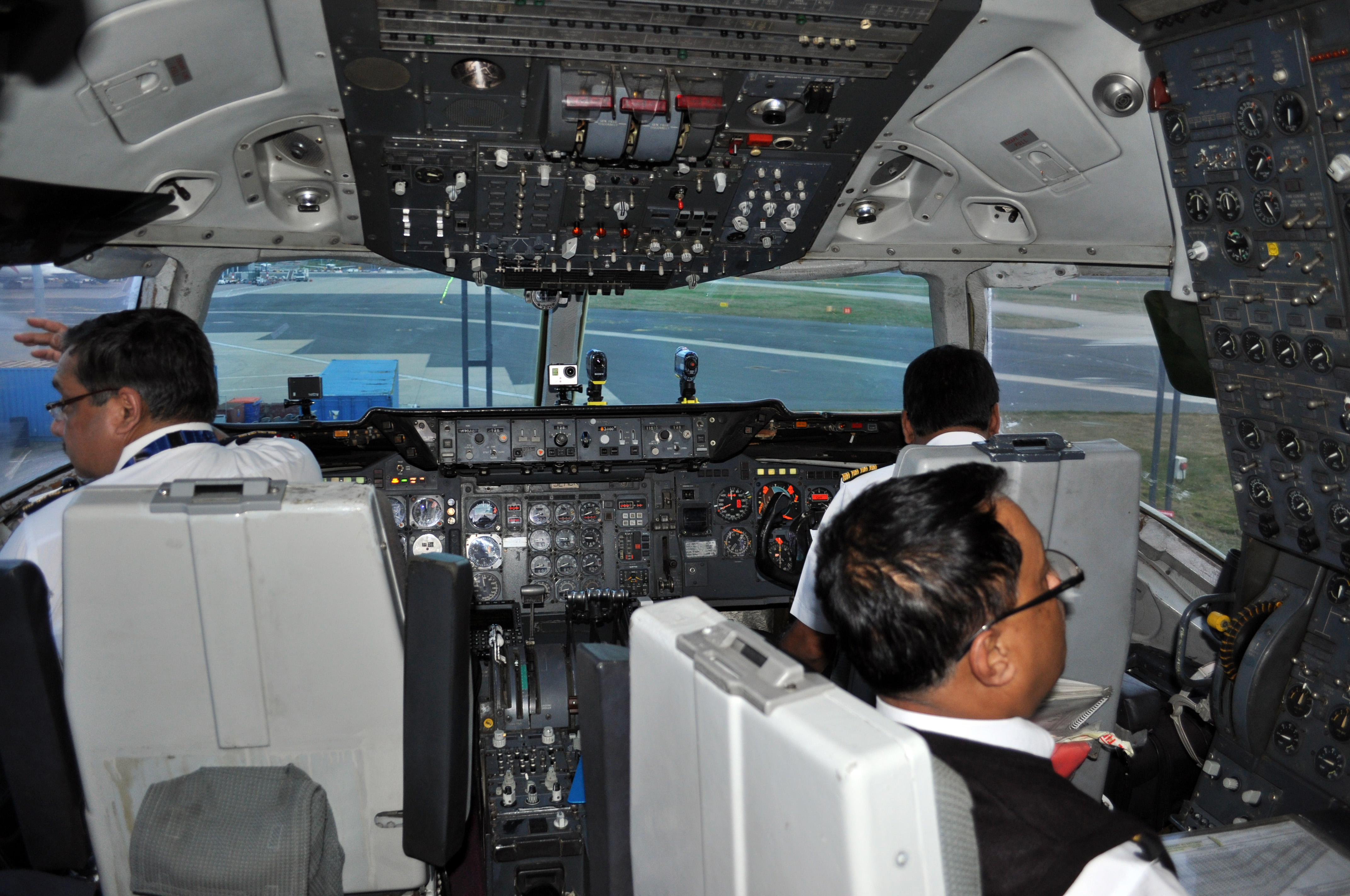 MSN 48317 DOUGLAS DC10-30 BIMAN BENGLADESH AIRLINES BHX